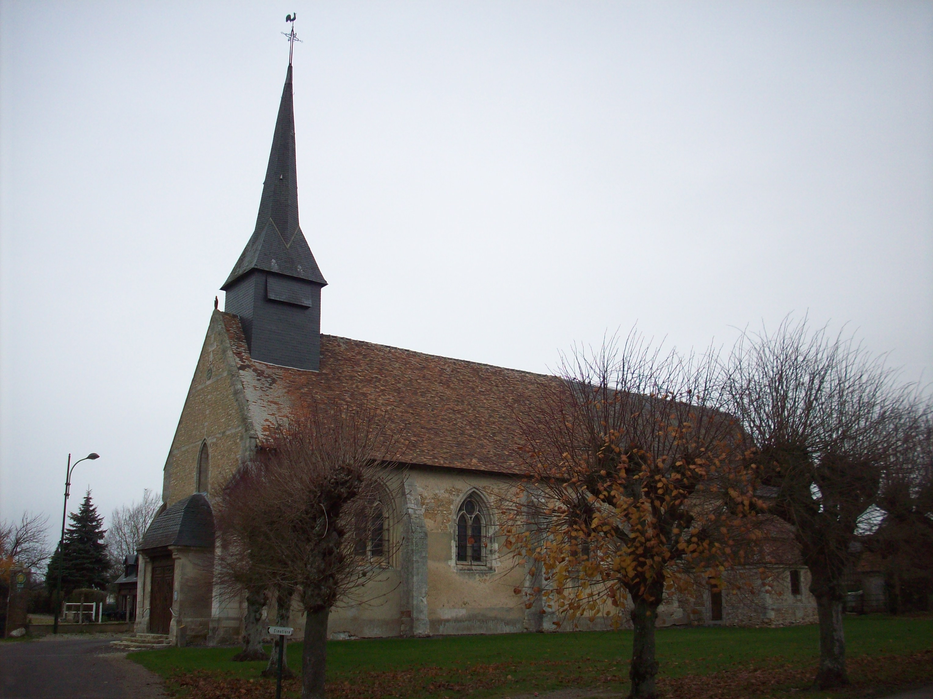 Église Sainte-Clotilde de Calleville.